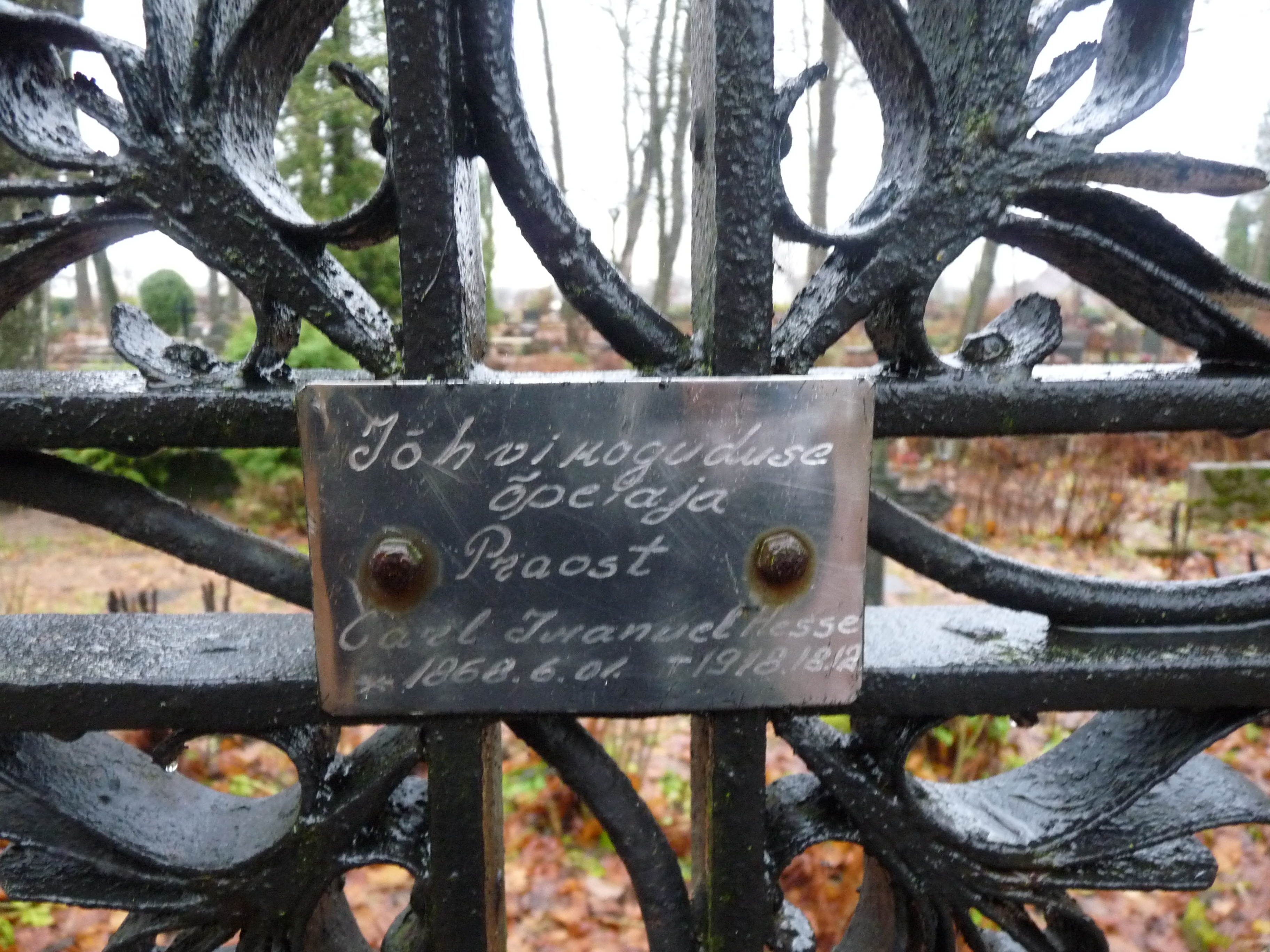 Plaat Carl Immanuel Hesse ristil Jõhvi surnuaial, 4. november 2012